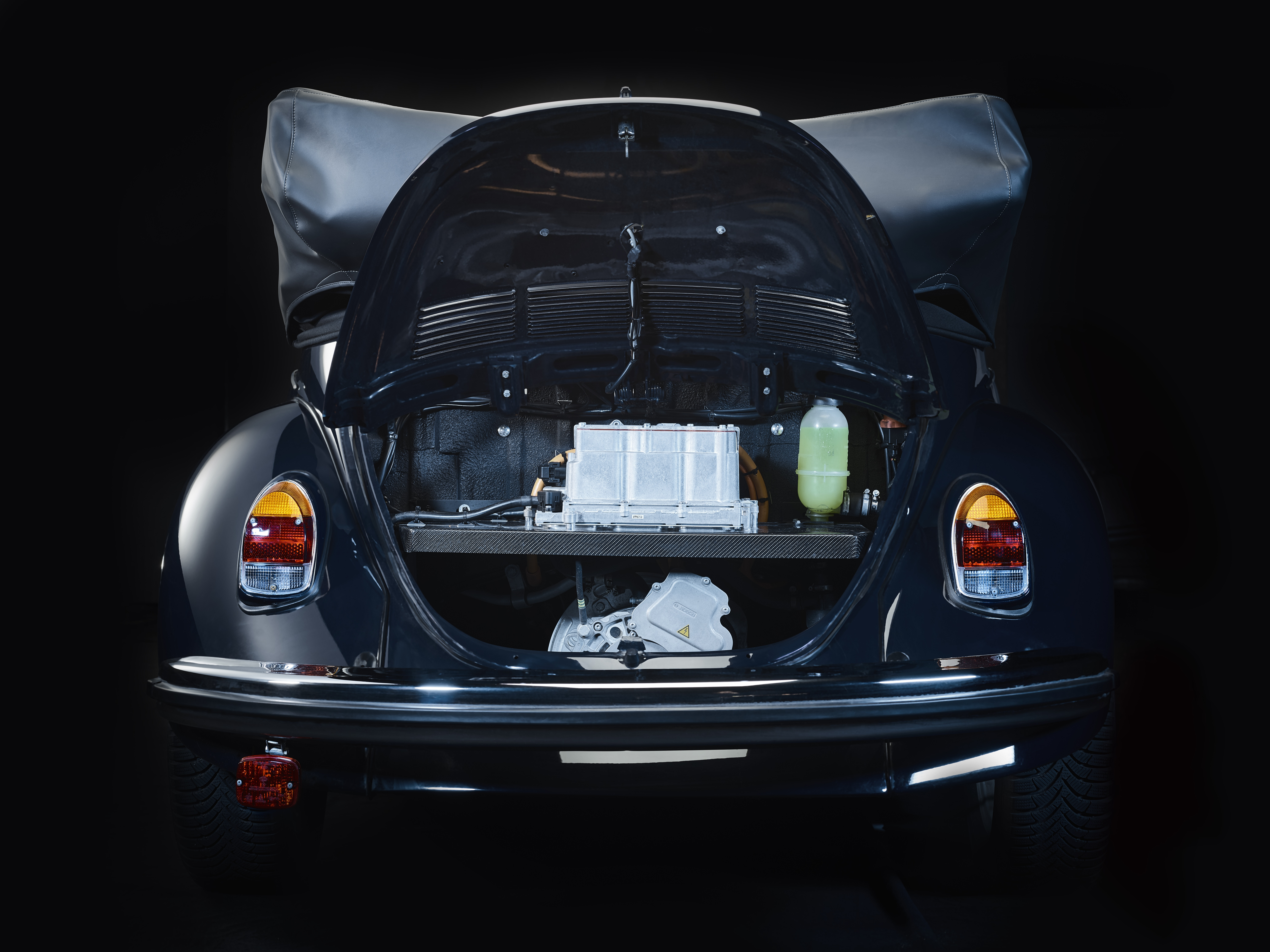 Hier sieht man den anstelle des Boxermotor verbauten Elektromotor und die dazugehörige Elektronik.